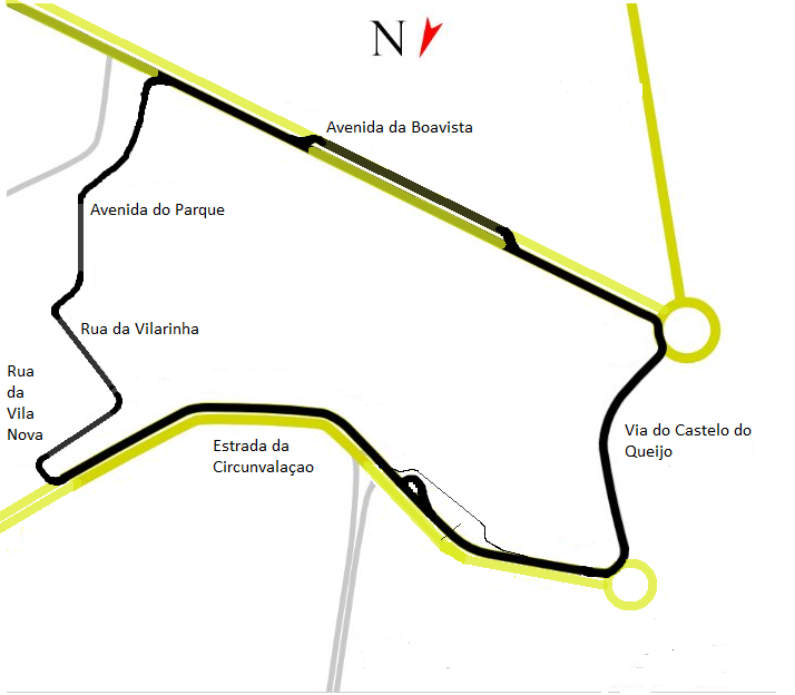 circuito da boavista (porto, portugal)